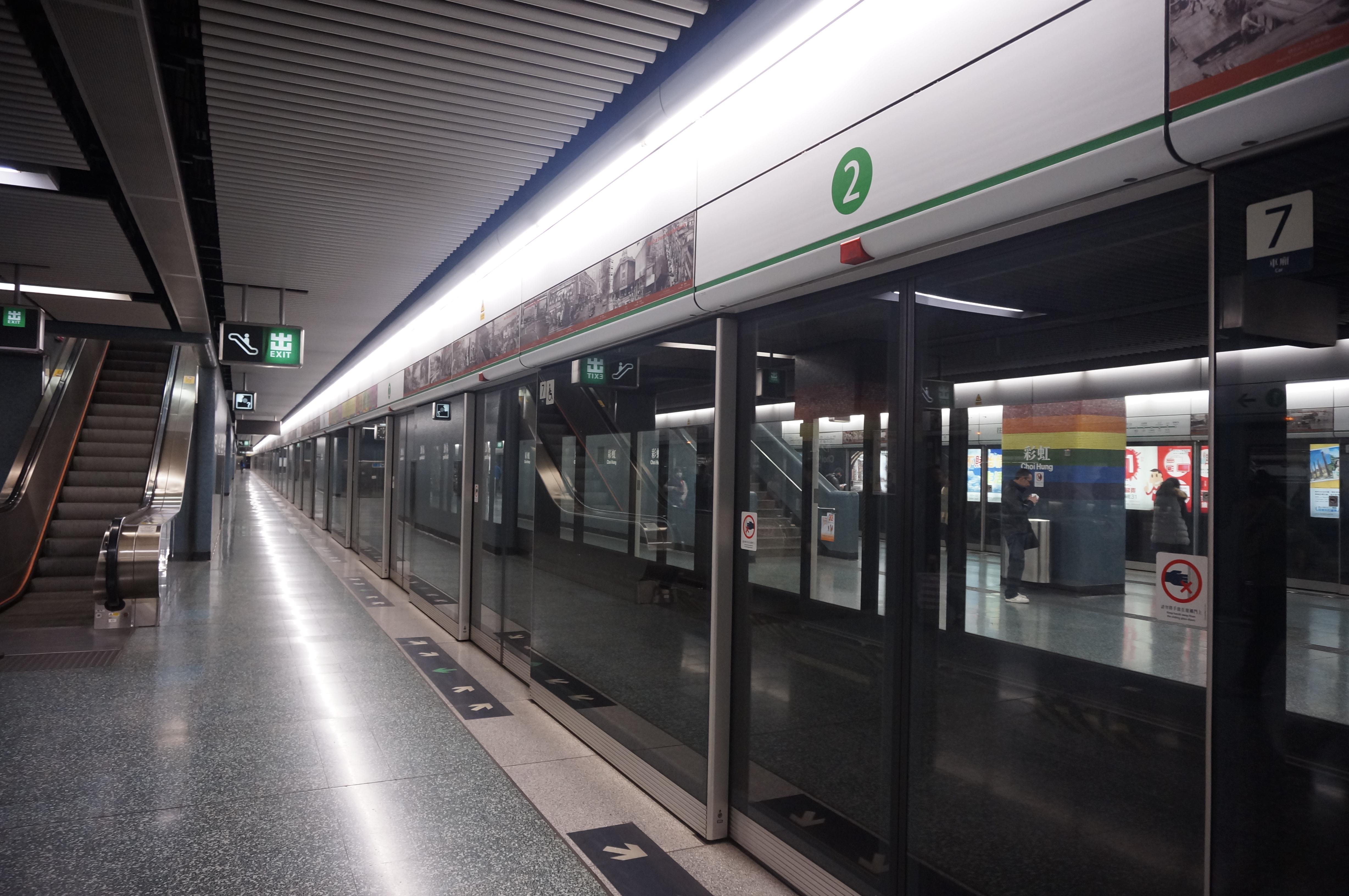 港鐵彩虹站月台